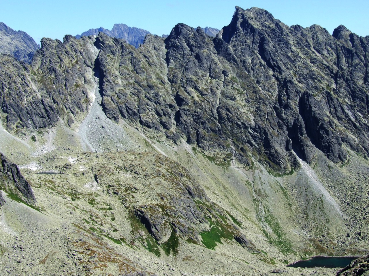 Grań Baszt oraz Niżni i Wyżni Kozi Staw